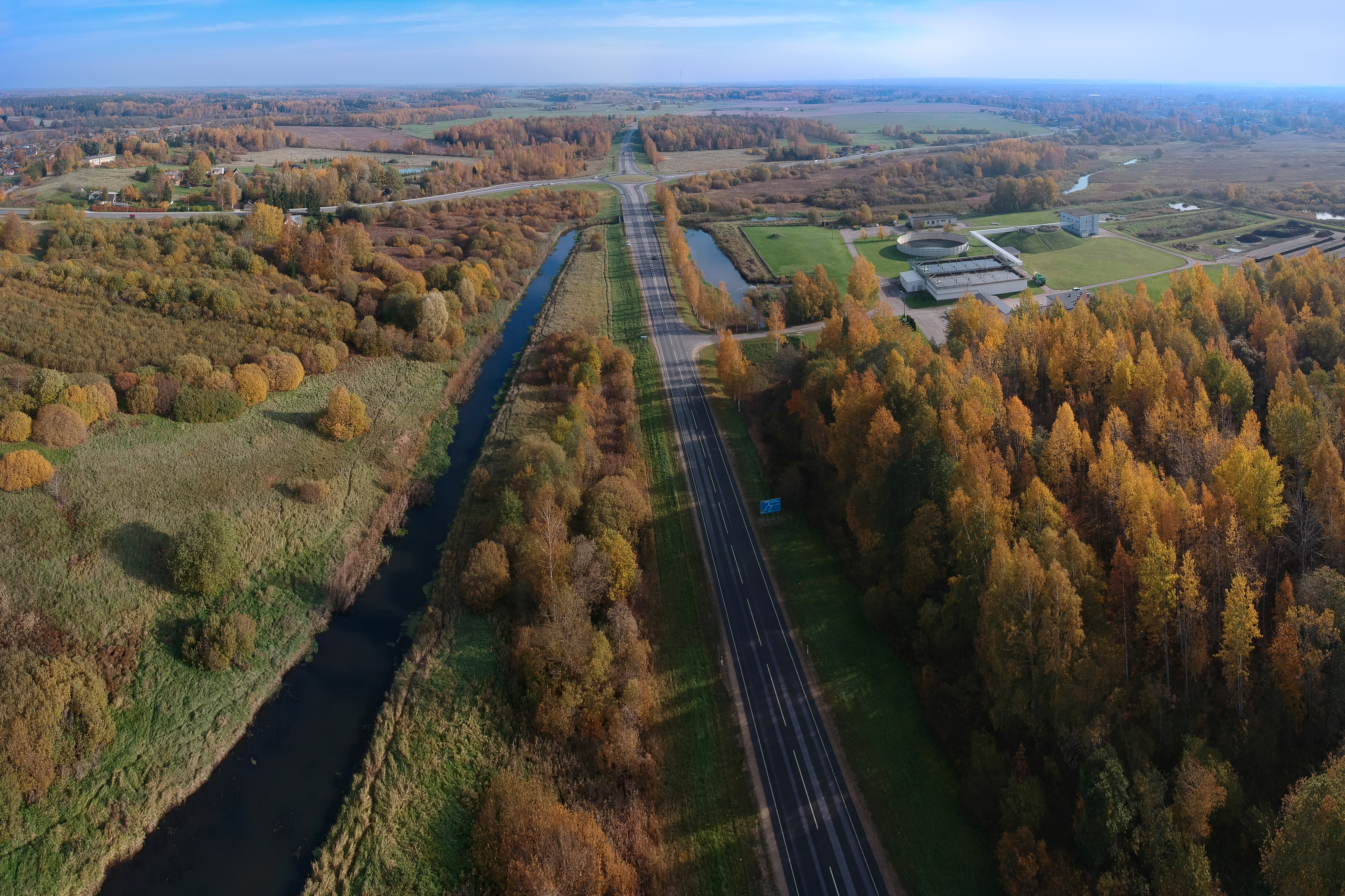 Tallinna-Tartu-Luhamaa maantee Võru lähedal